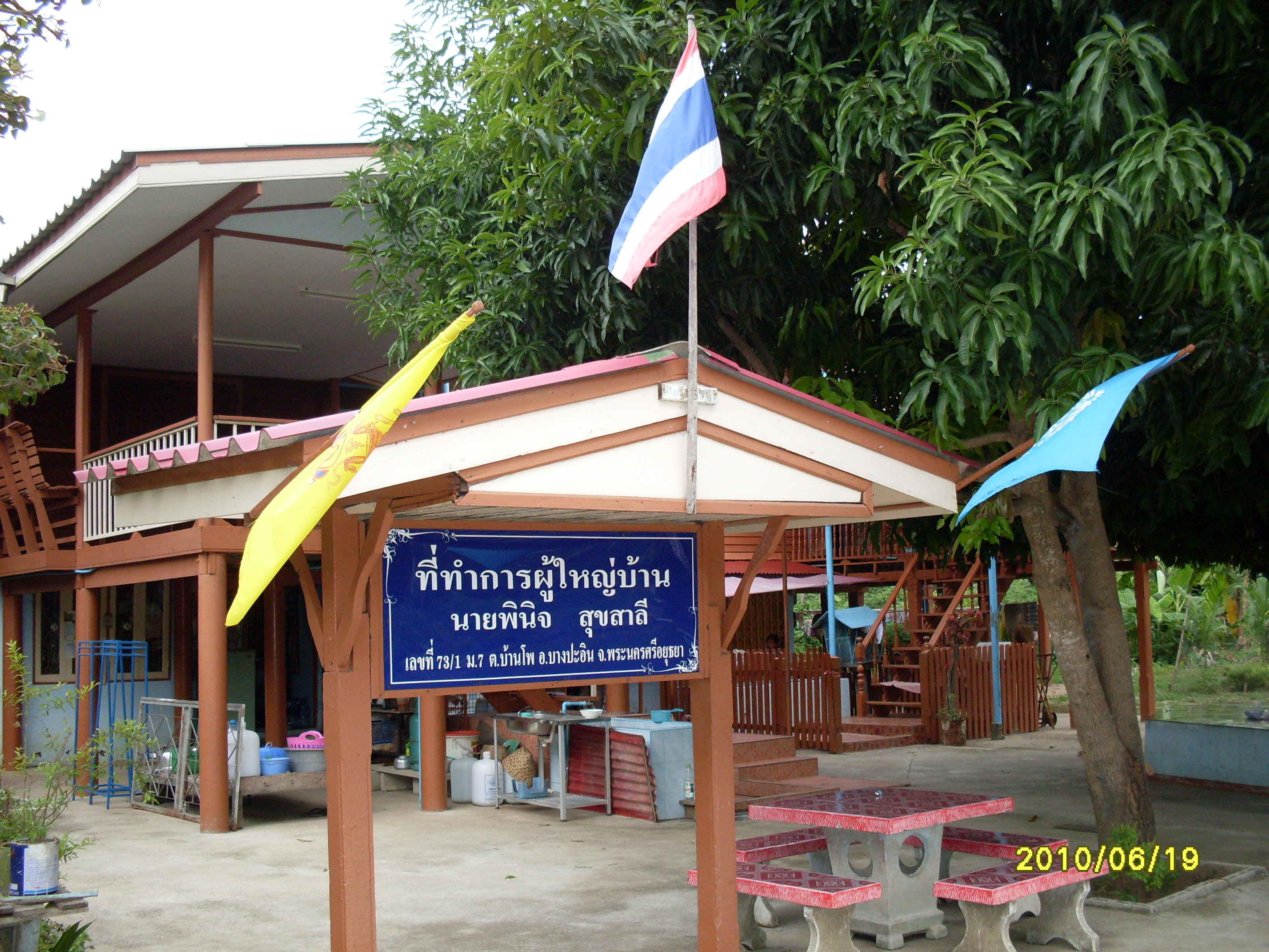 ที่ทำการผู้ใหญ่บ้าน หมู่ 7 ต.บ้านโพ อ. บางปะอิน จ.พระนครศรีอยุธยา